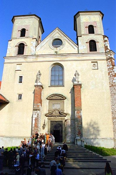 Tyniec Monastry in Krakow (Poland)